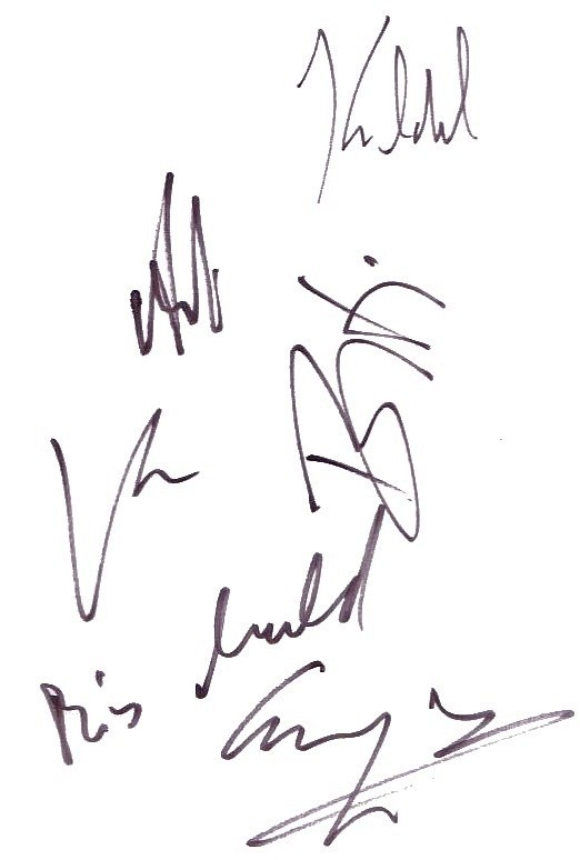 Autogramme aller Mitglieder der Band Die Toten Hosen, 2006.